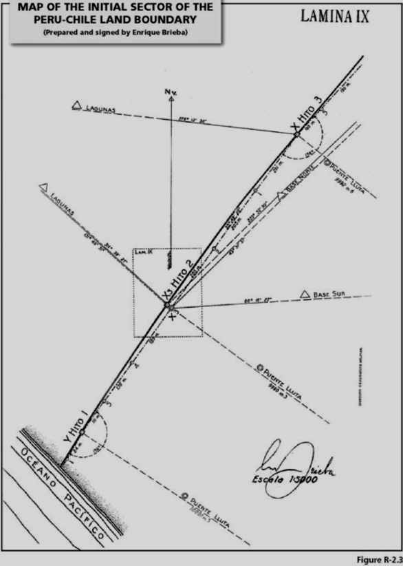 Mapa del sector inicial de la frontera entre Peru y Chile, preparado y firmado por Enrique Brieba. Documento presentado por el Gobierno del Peru ante la Corte Internacional de Justicia en la Controversia Marítima (Perú v. Chile)